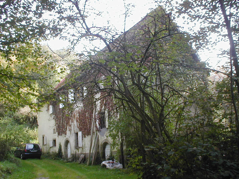 Barthsmühle im Fünfmühlental bei Bad Rappenau, Baden-Württemberg, Deutschland